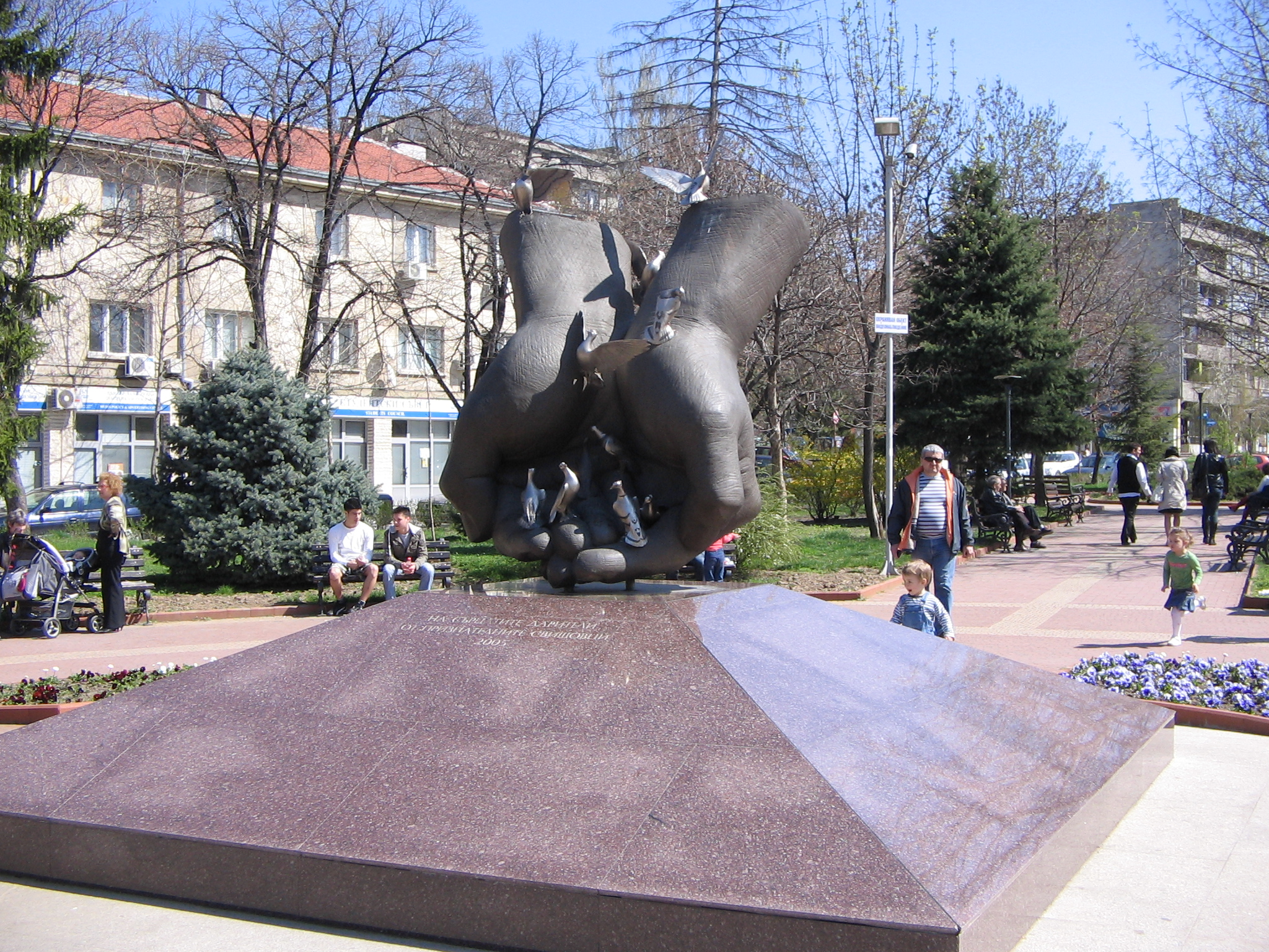 паметник на дарителите от признателните свищовци